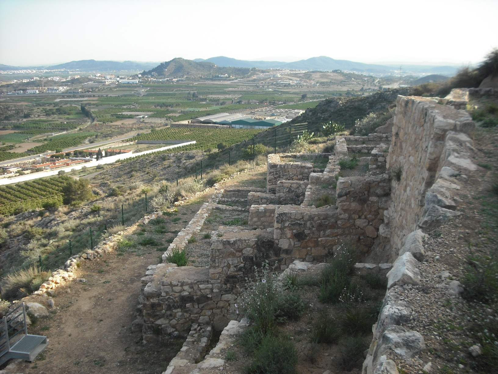 Vista del jaciment del Tossal de Sant Miquel, que correspon a la ciutat ibera d'Edeta.